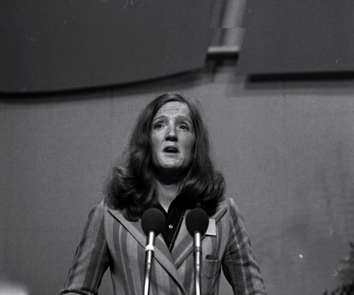 22. Bundesparteitag der CDU in Hamburg (Bürgerschaftsabgeordnete Hamburg, Birgit Breuel) 18.-20.11.1973